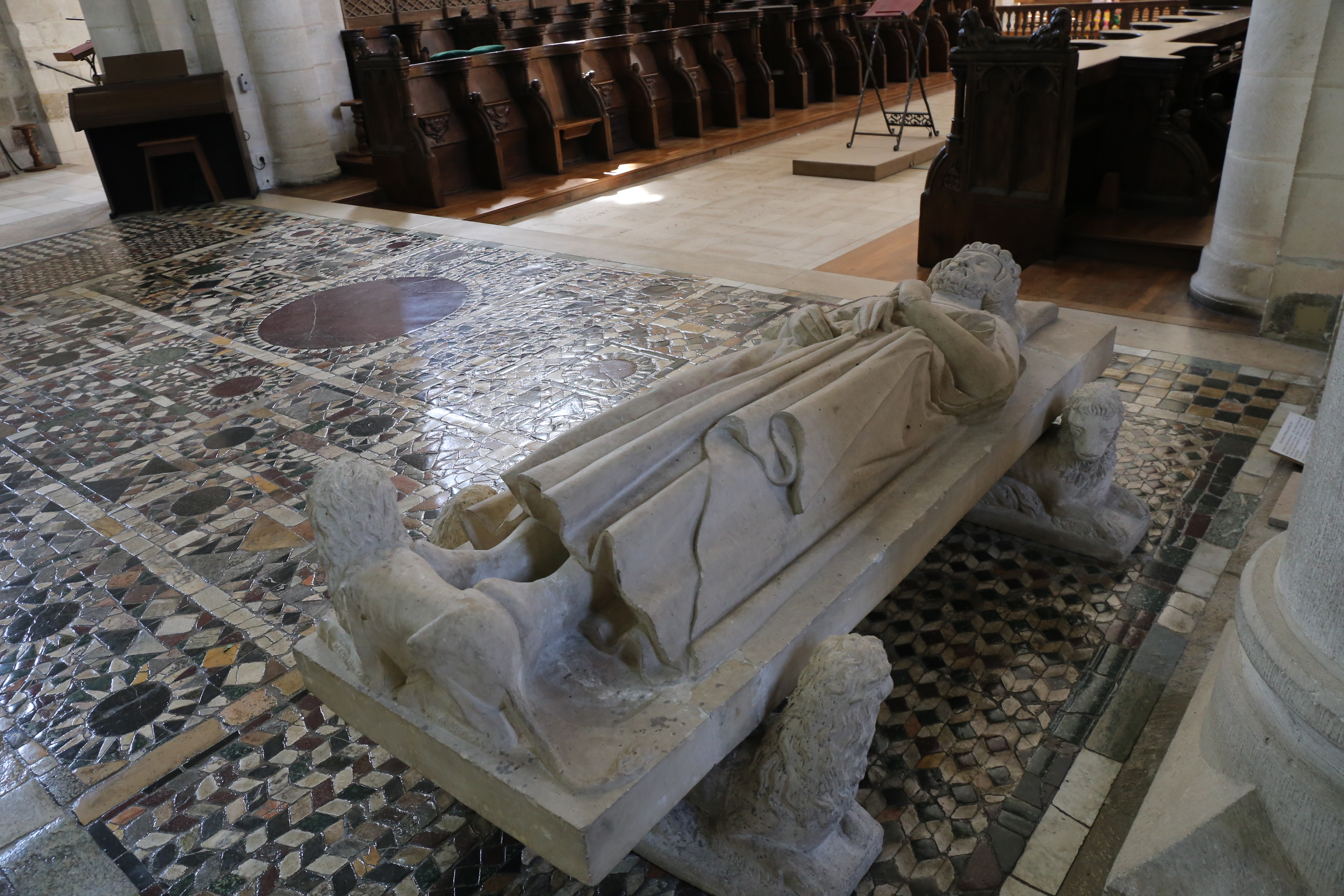 Gisant de Philippe Ier de France dans l'abbatiale Saint-Benoît de Saint-Benoît-sur-Loire. .